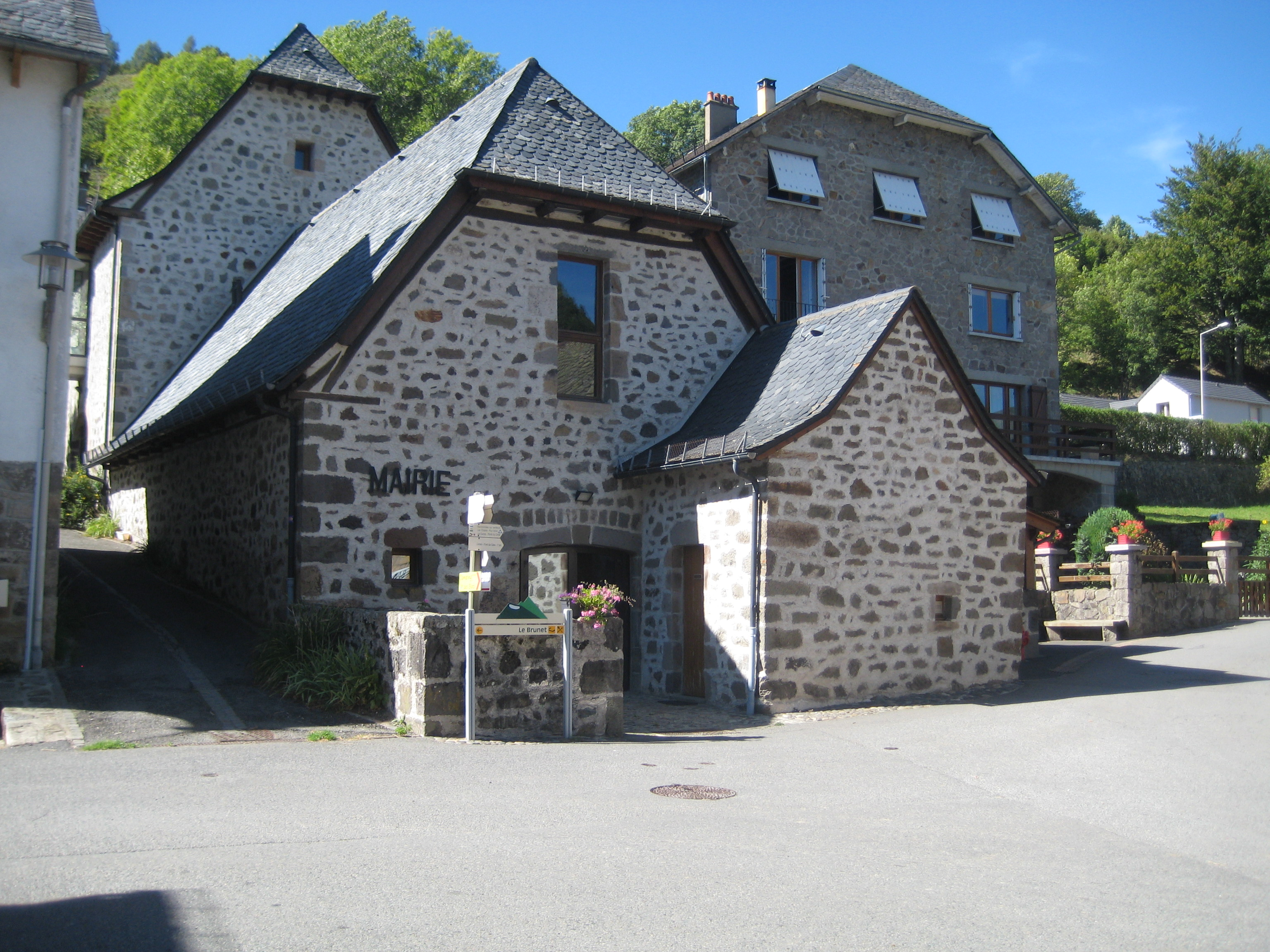 Mairie de Saint-Jacques-des-Blats